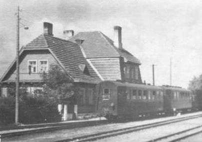 Беларуская (тарашкевіца): Браслаў (Brasłaŭ), вуліца Садовая (vulica Sadovaja). Чыгуначная станцыя